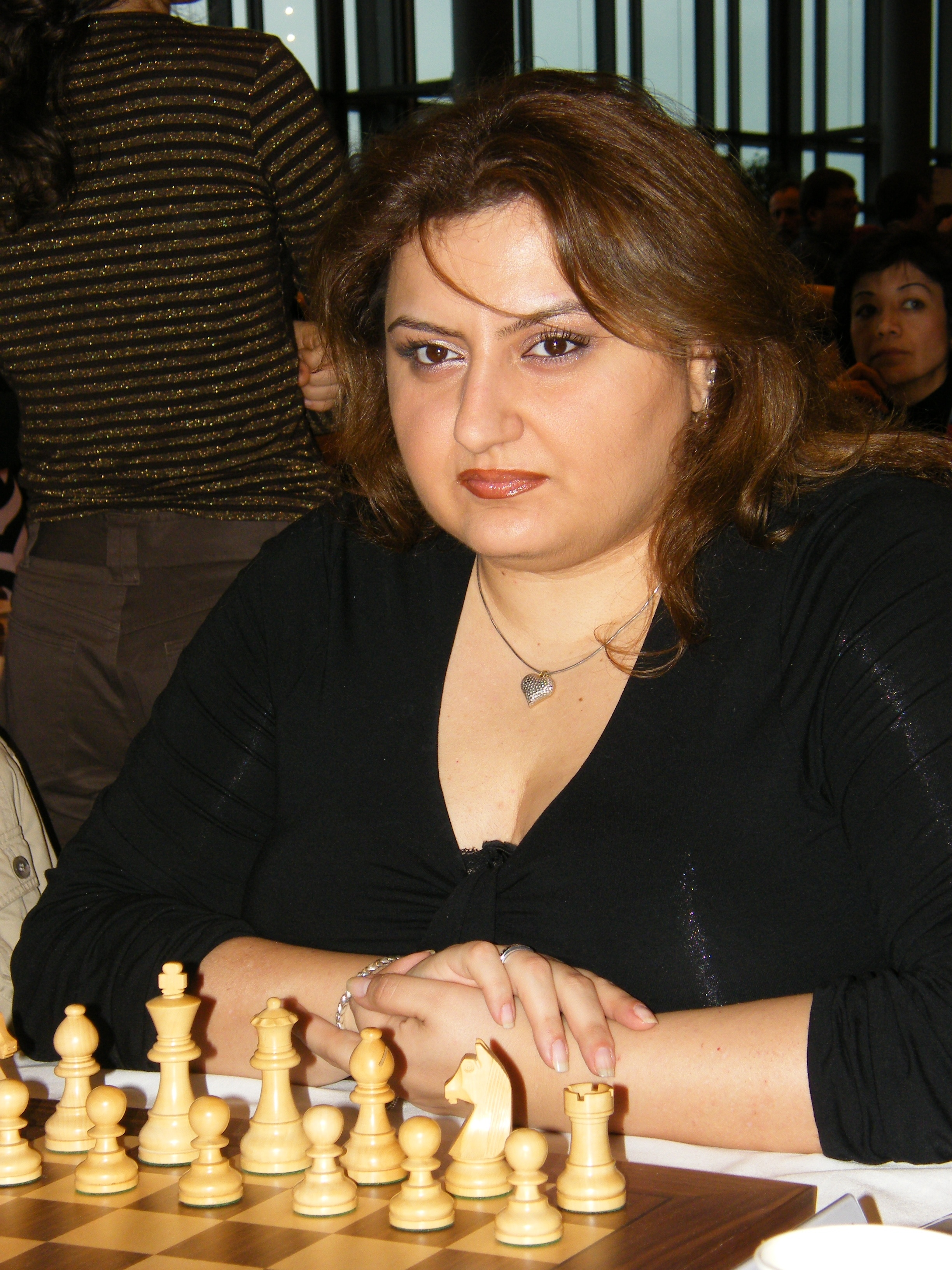 Elina Danieljan bei der 38. Schacholympiade in Dresden 2008